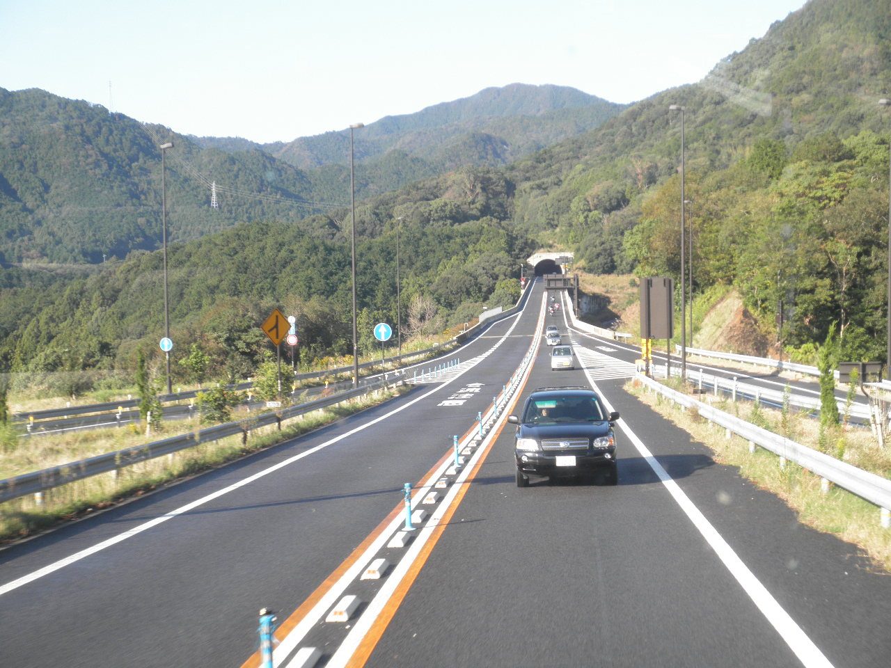 和歌山県新宮市佐野 国道42号那智勝浦道路